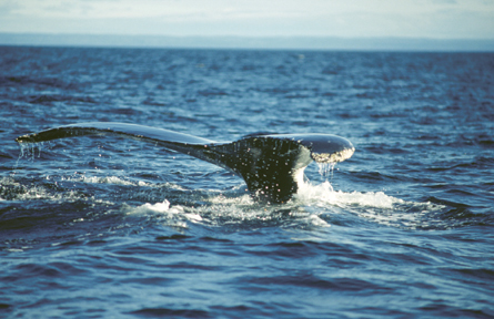 Queue de baleine – Manicouagan, Québec, Canada. Whale tail in Manicougan (Québec, Canada)